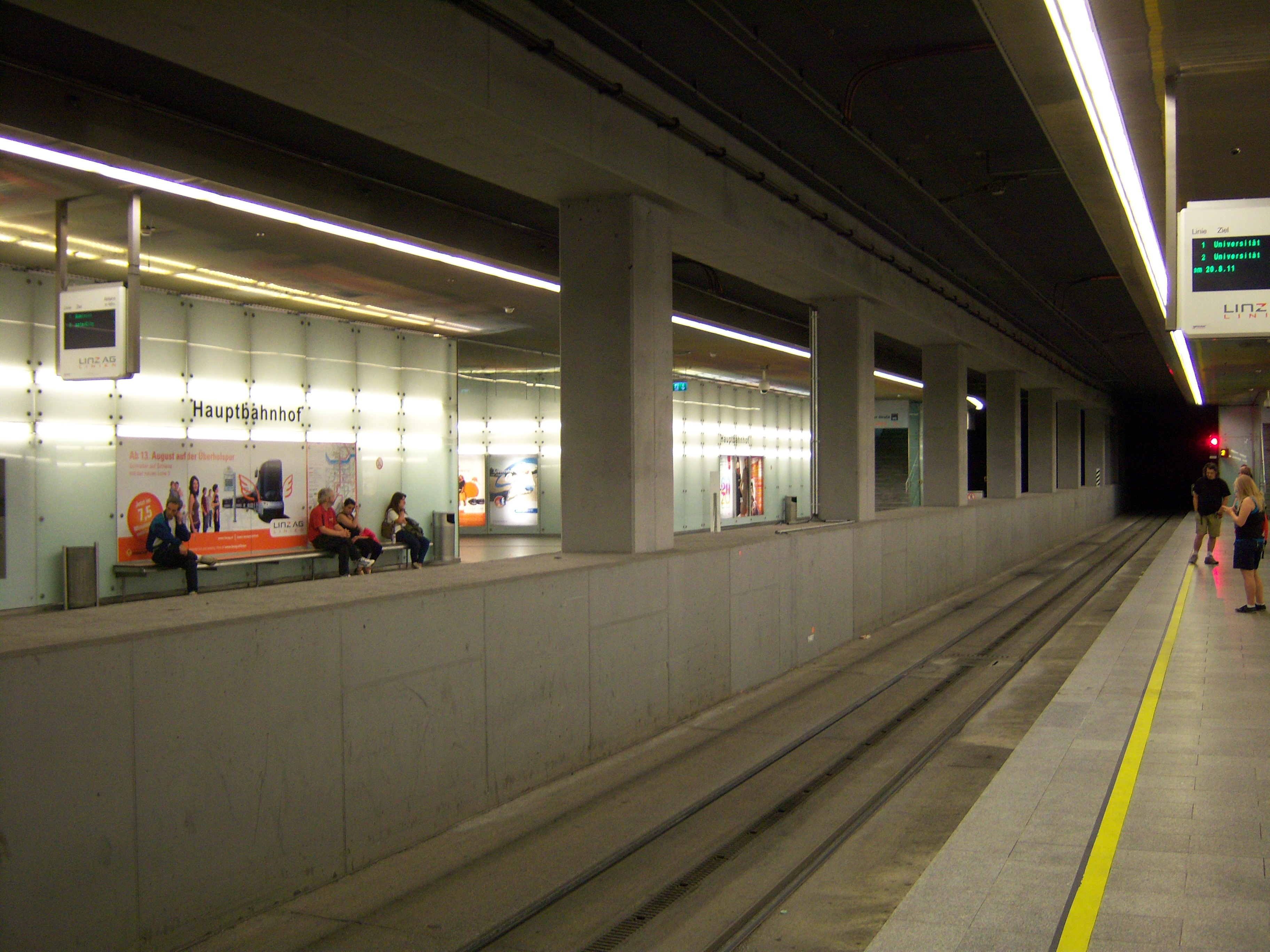 Haltestelle am Hauptbahnhof der Linzer Unterpflasterstraßenbahn